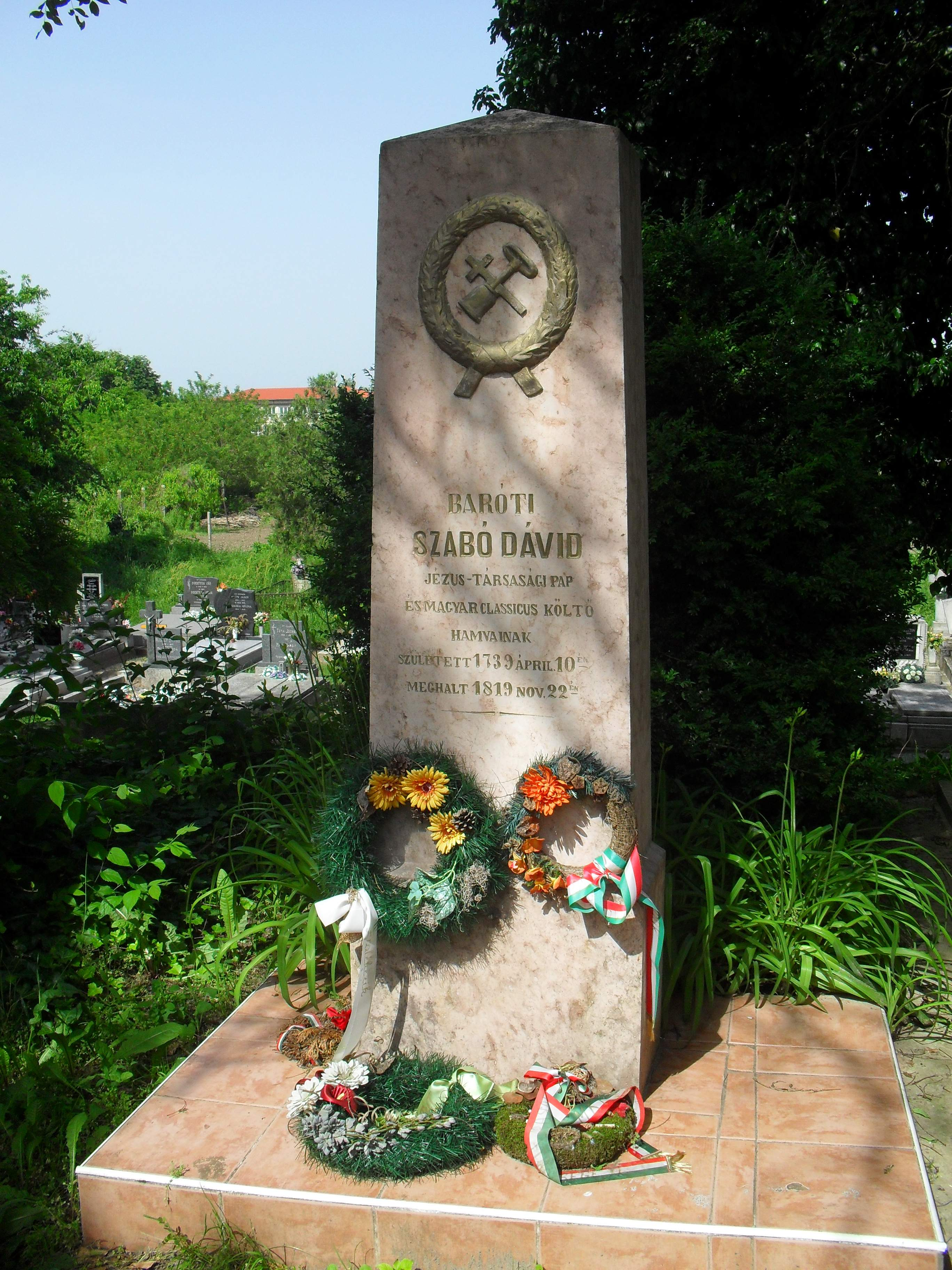 Virt - Baróti Szabó Dávid síremléke a temetőben